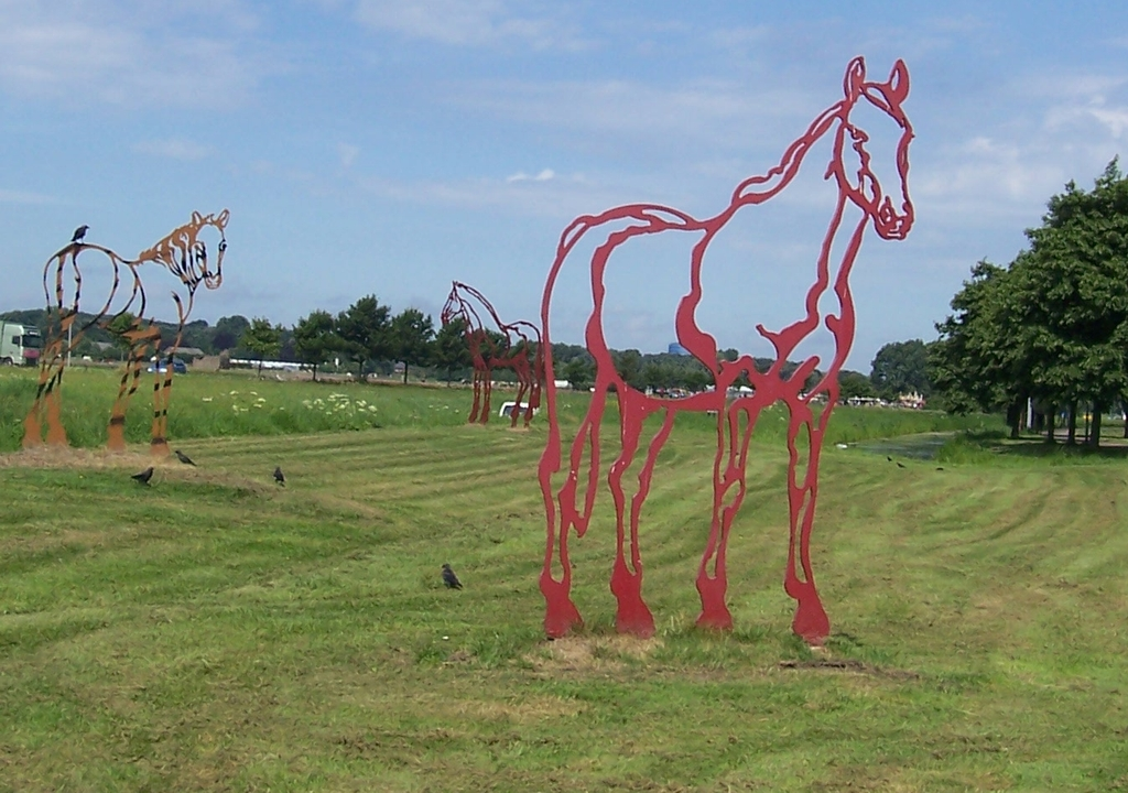 Paarden, vensters in landschap (Valkenburg, Katwijk) Langs N206 Ing. Tjalmaweg